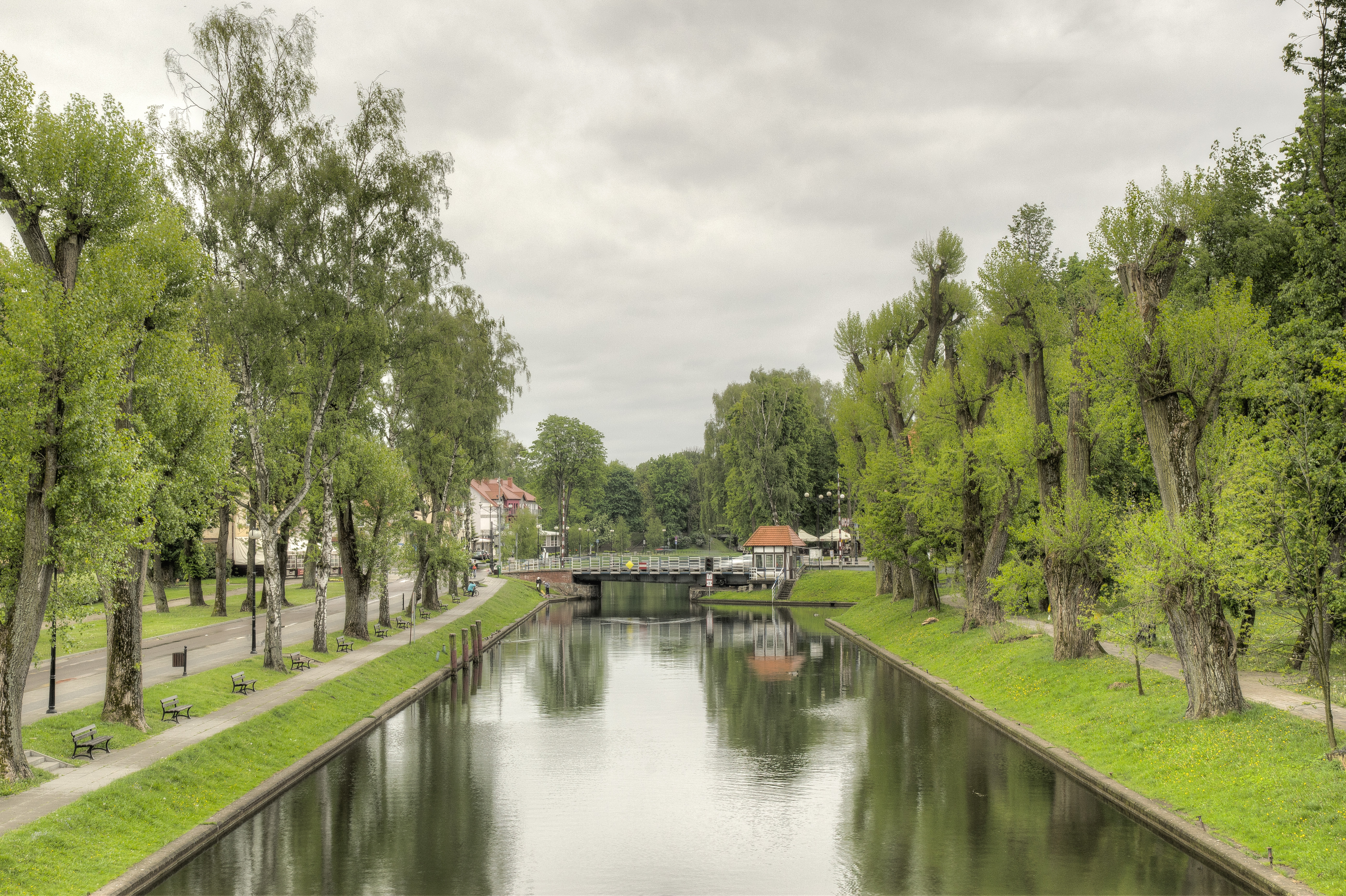 Widok na Kanał Giżycki z mostem obrotowym.